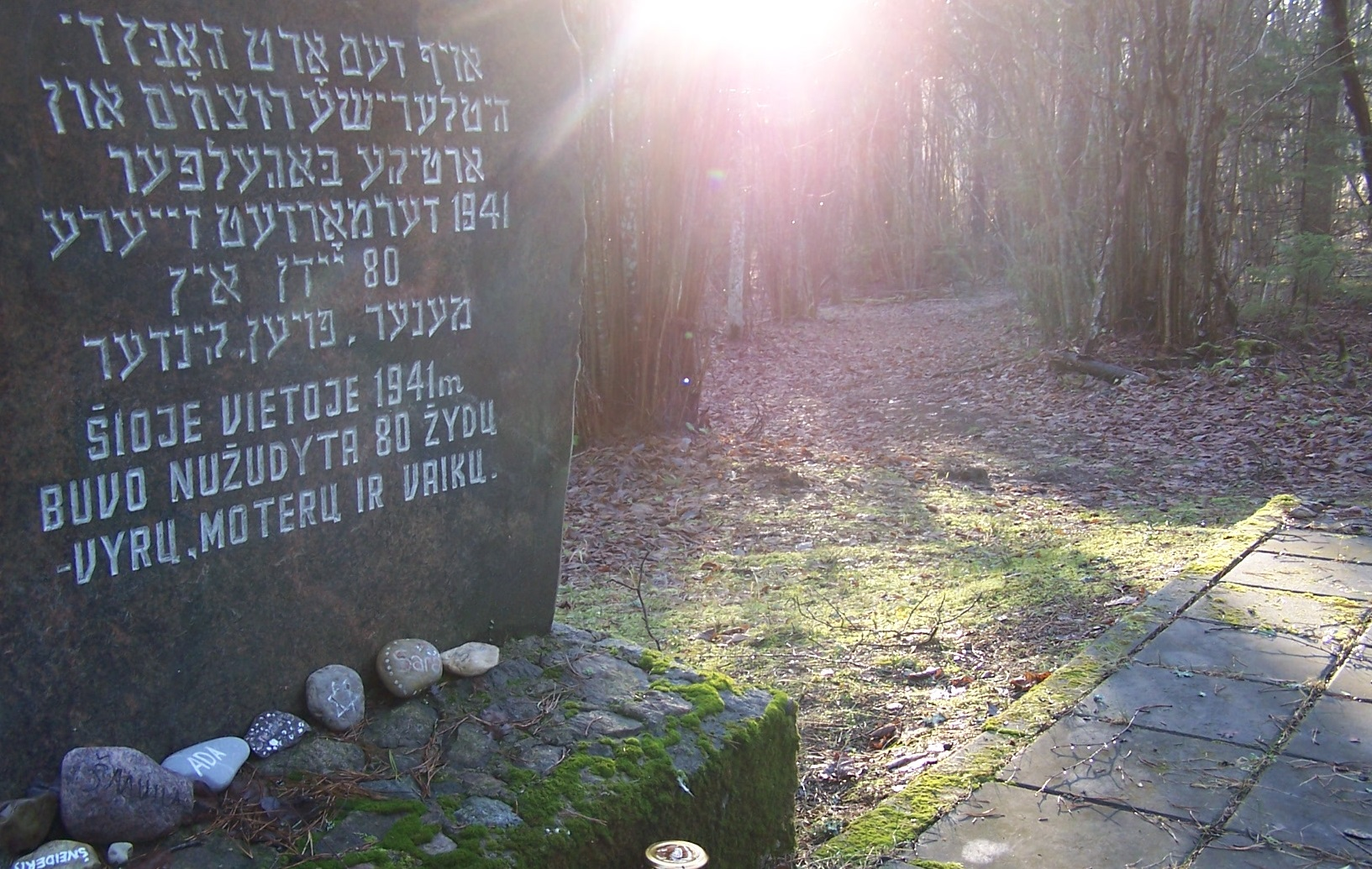 Subačiaus žydų žudynių vietos ir kapo paminklas